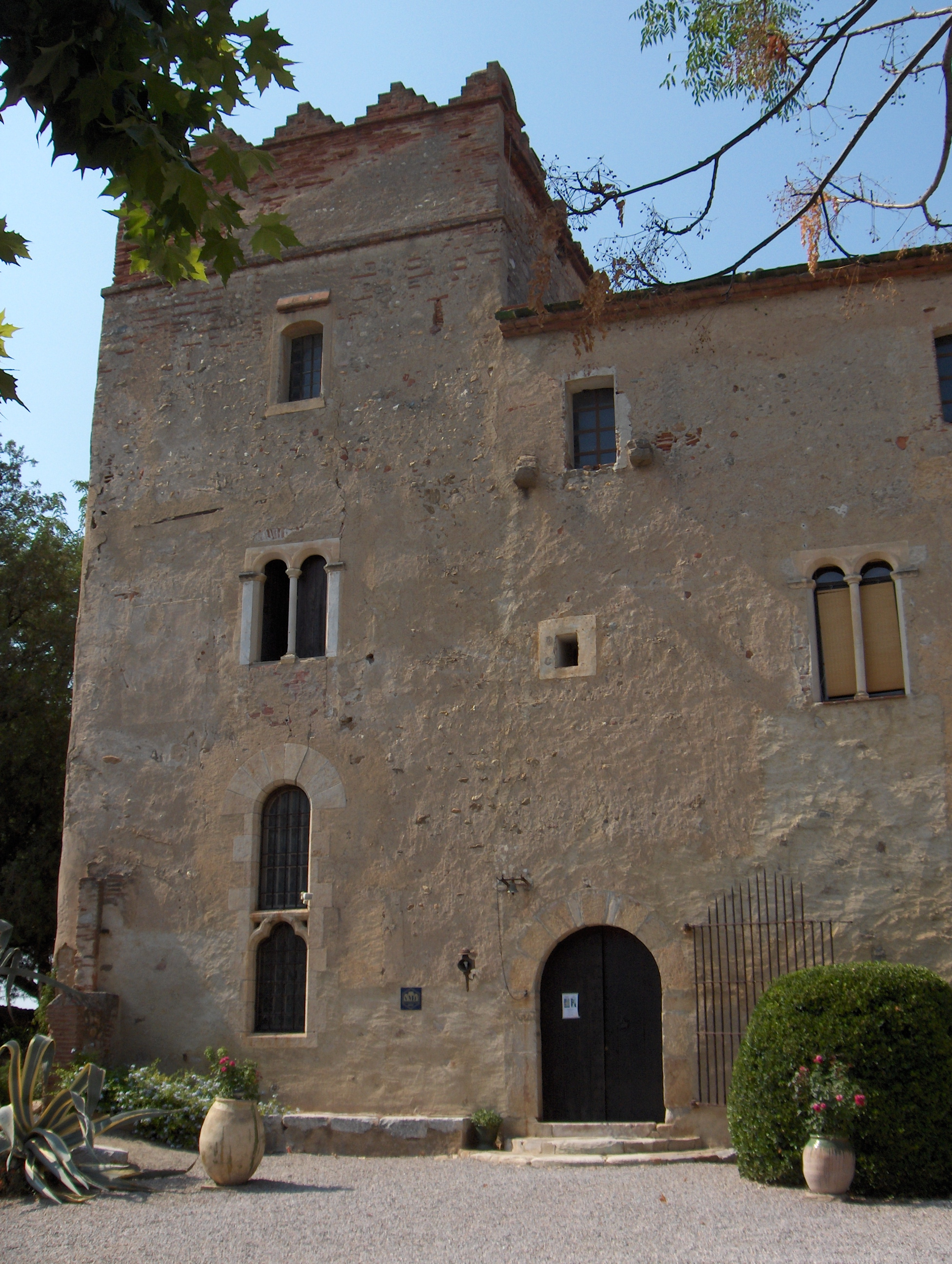 Priorat de Sant Esteve de Monestir del Camp, a Paçà.